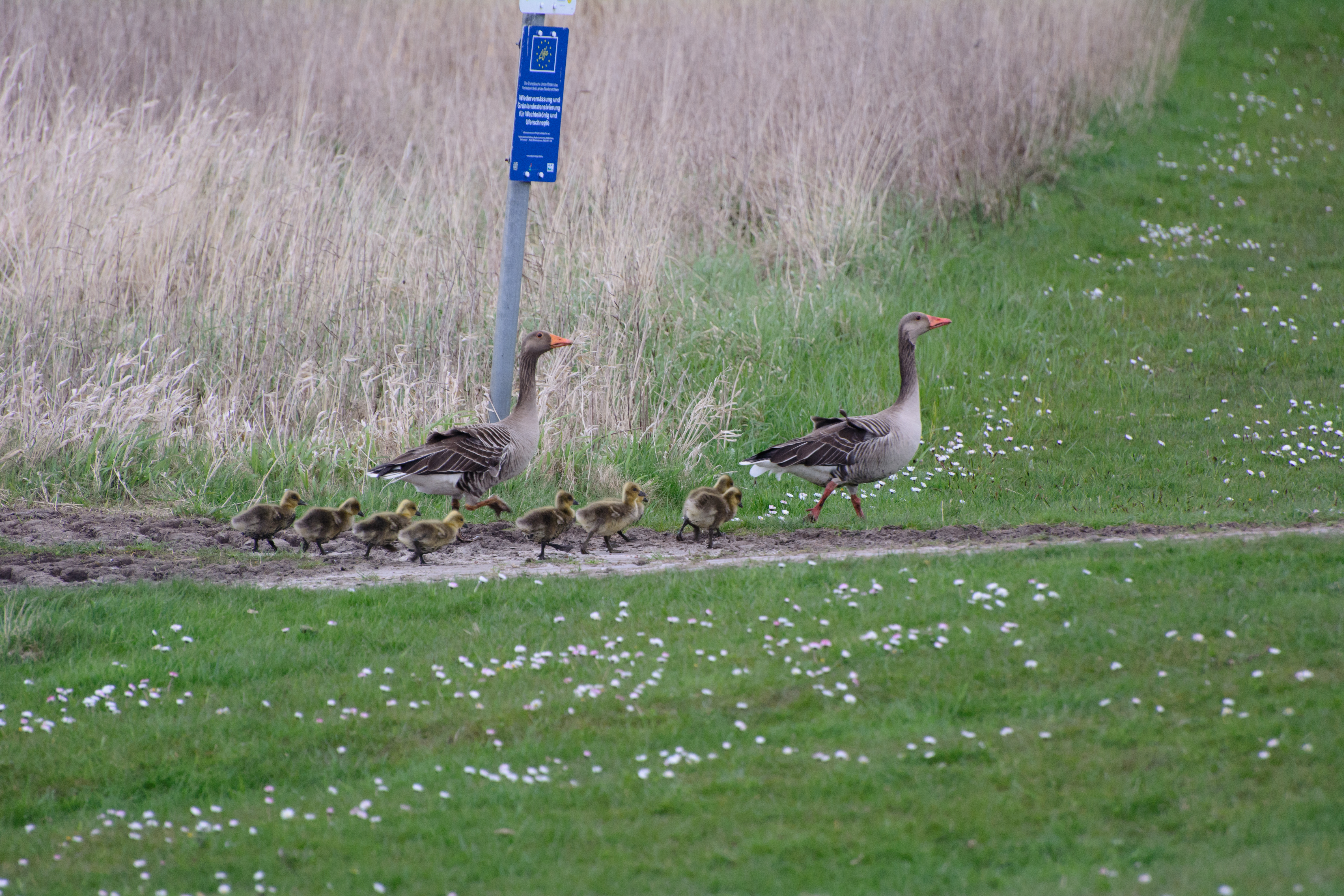 Stolz verlässt ein Graugänsepaar (Anser anser) mit seiner Brut den ausgewiesenen Schutzbereich um kurz danach den Wanderweg zu überqueren. Aufgenommen im Bereich des Nationalparks Niedersächsisches Wattenmeer auf Langeoog. Auf dem Schild steht „Wiedervernässung und Grünlandextensivieung für Wachtelkönig und Uferschnepfe“. – Fotografiert habe ich mit einer Nikon D5200 und dem Objektiv AF-S Nikkor70-300mm 1:4.5-5.6 G